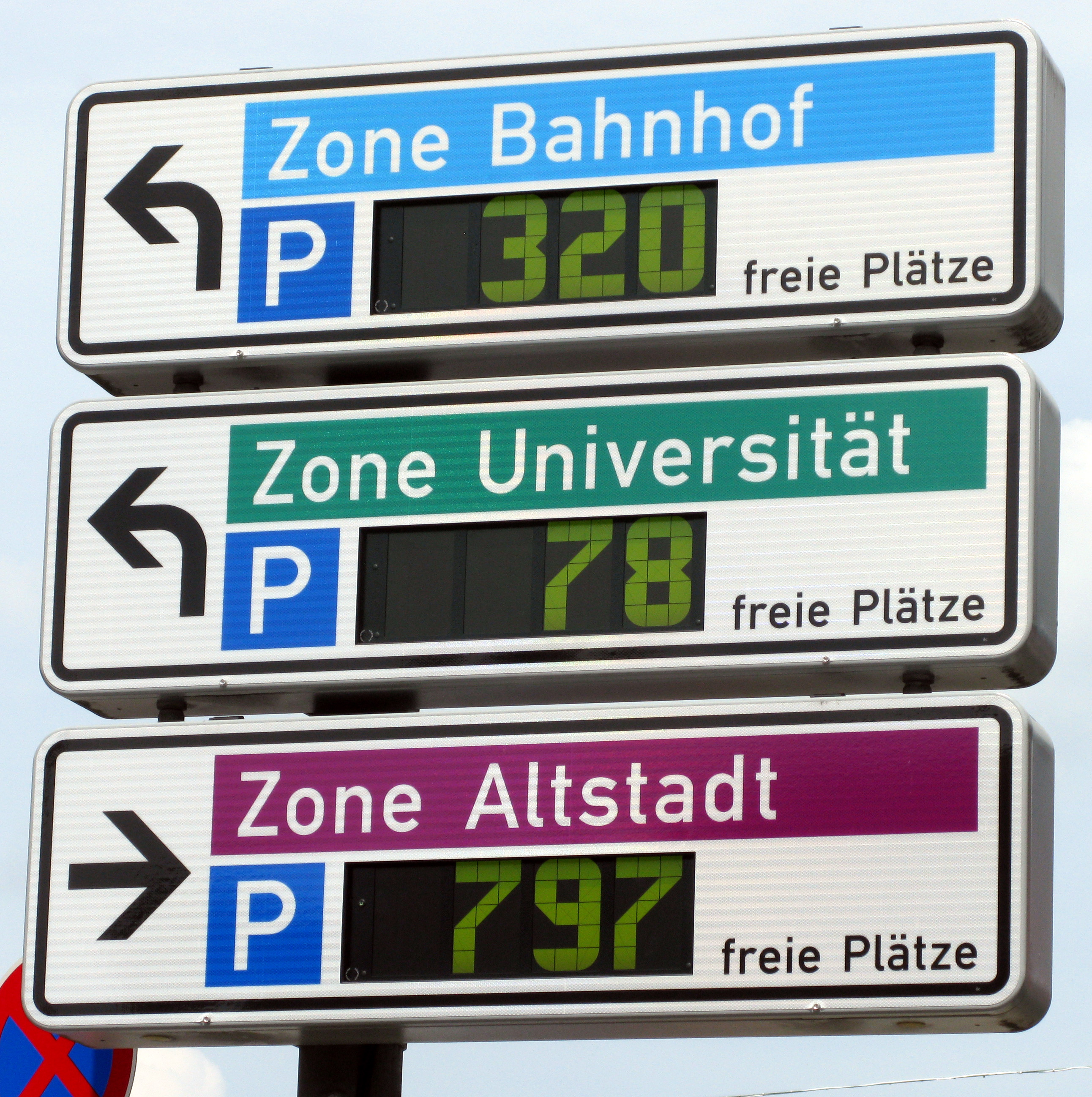 Parkleitsystem in Freiburg, seit Mai 2018 erneuert